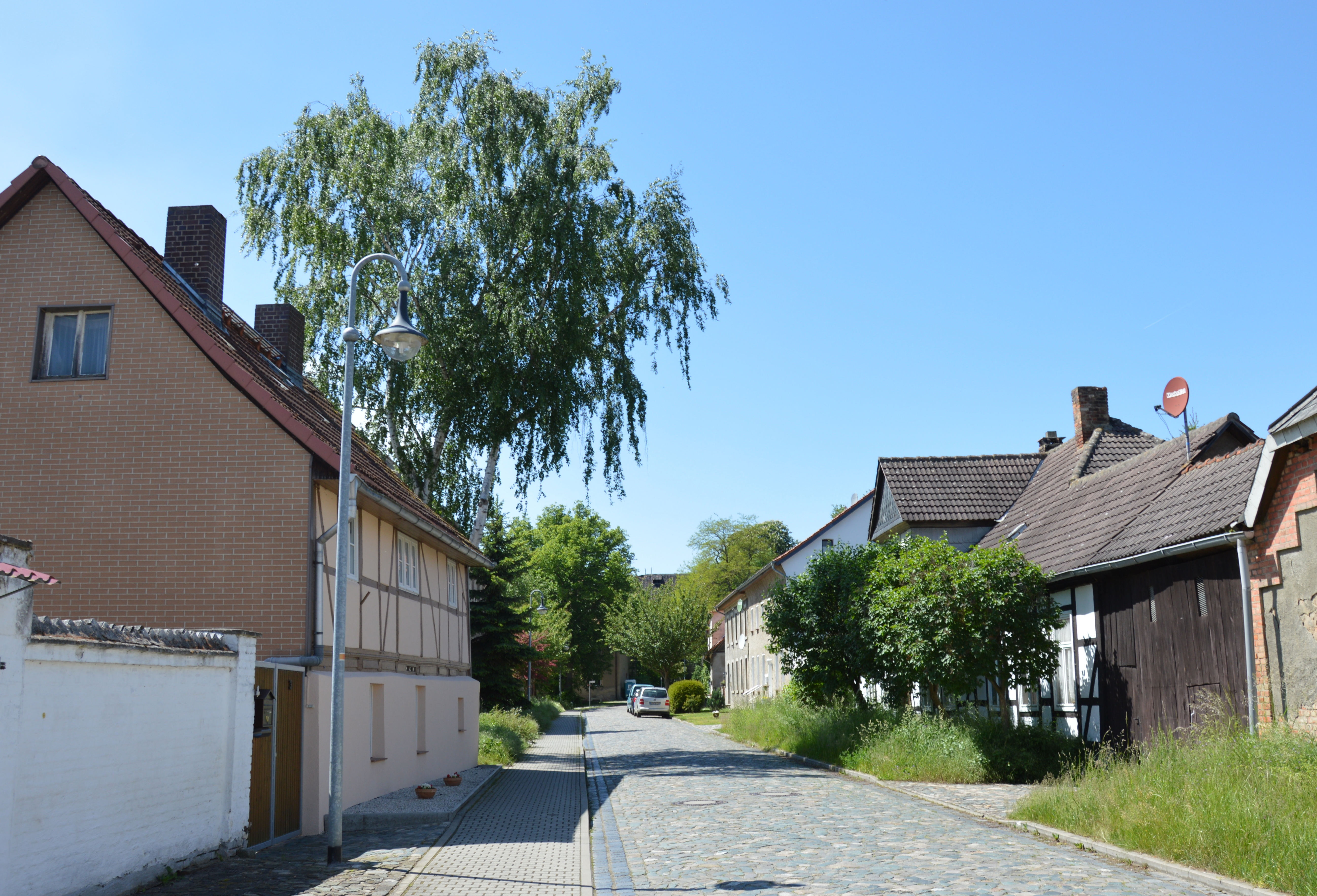 Vor dem Amt in Hötensleben